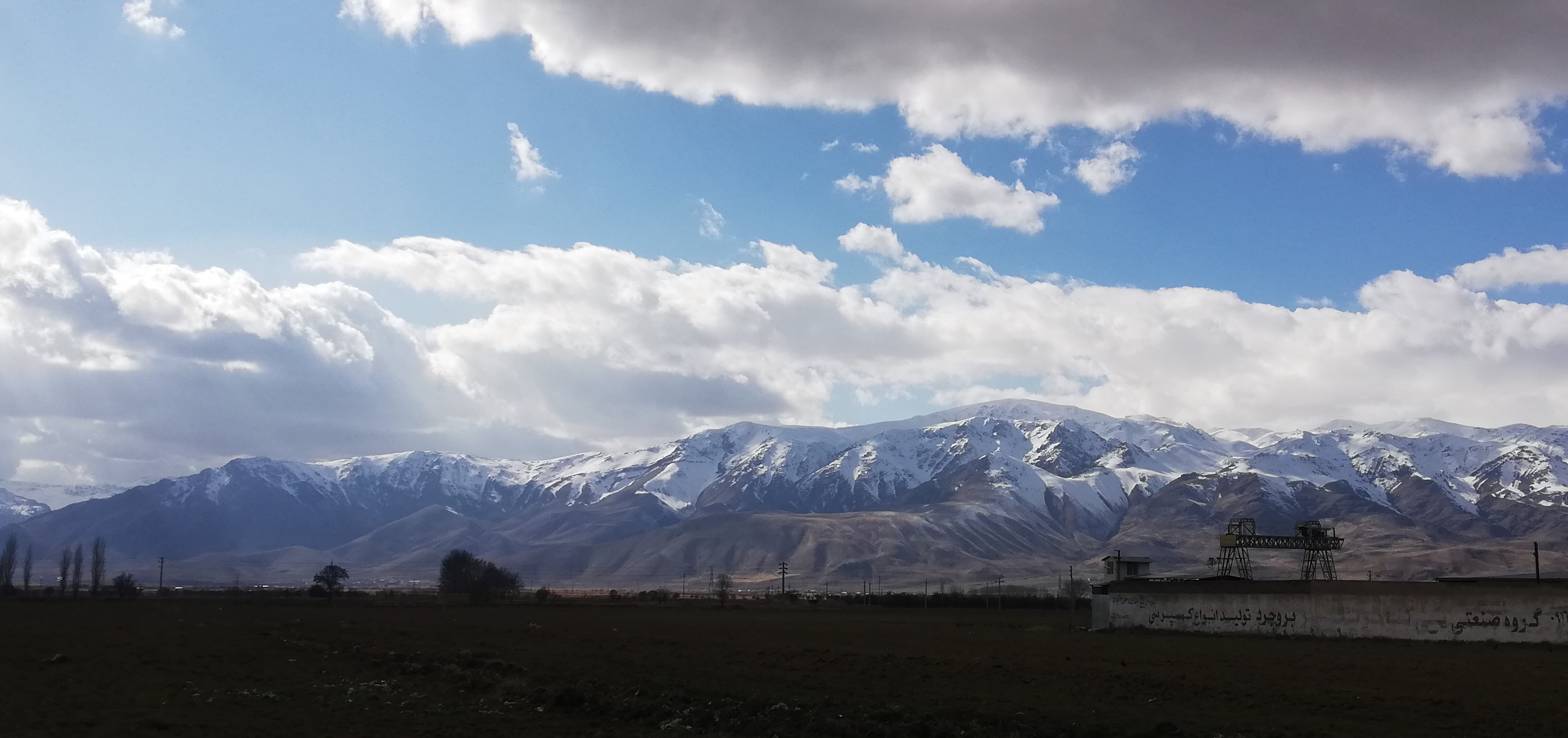 بروجرد در زمستان 1398